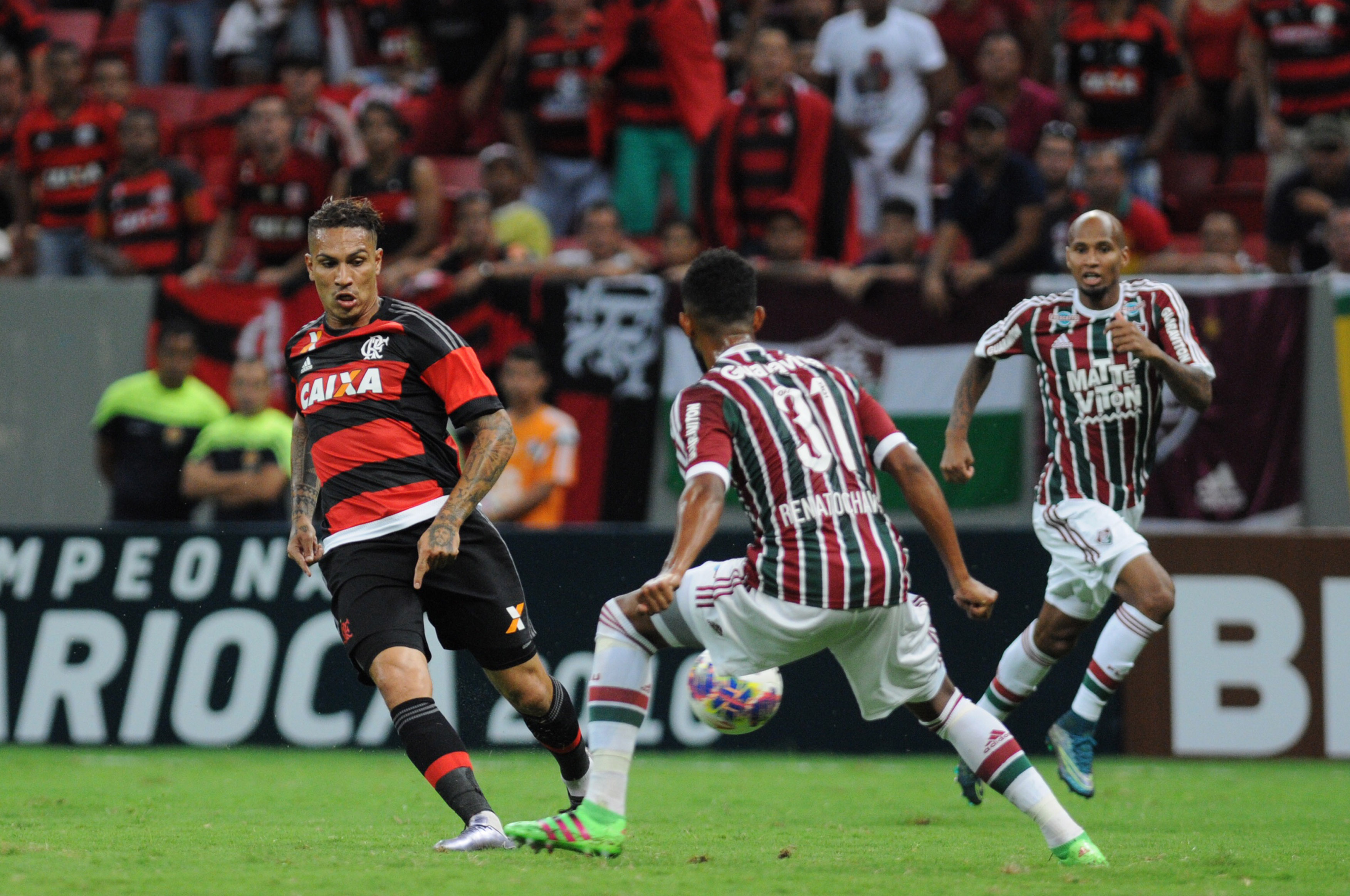 Estádio Mané Garrincha, Brasília, DF, Brasil 21/2/2016 Foto: Andre Borges/Agência Brasília Fluminense e Flamengo jogam neste domingo (21) pela quinta rodada do Campeonato Carioca no Estádio Mané Garrincha. A partida terminou com vitória do Flamengo sobre o Fluminense por 2 a 1.